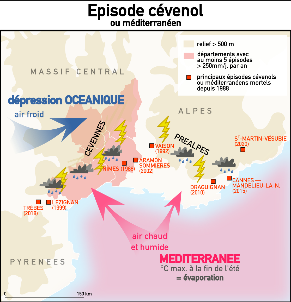 Schéma explicatif des épisodes cévenols/méditerranéens.